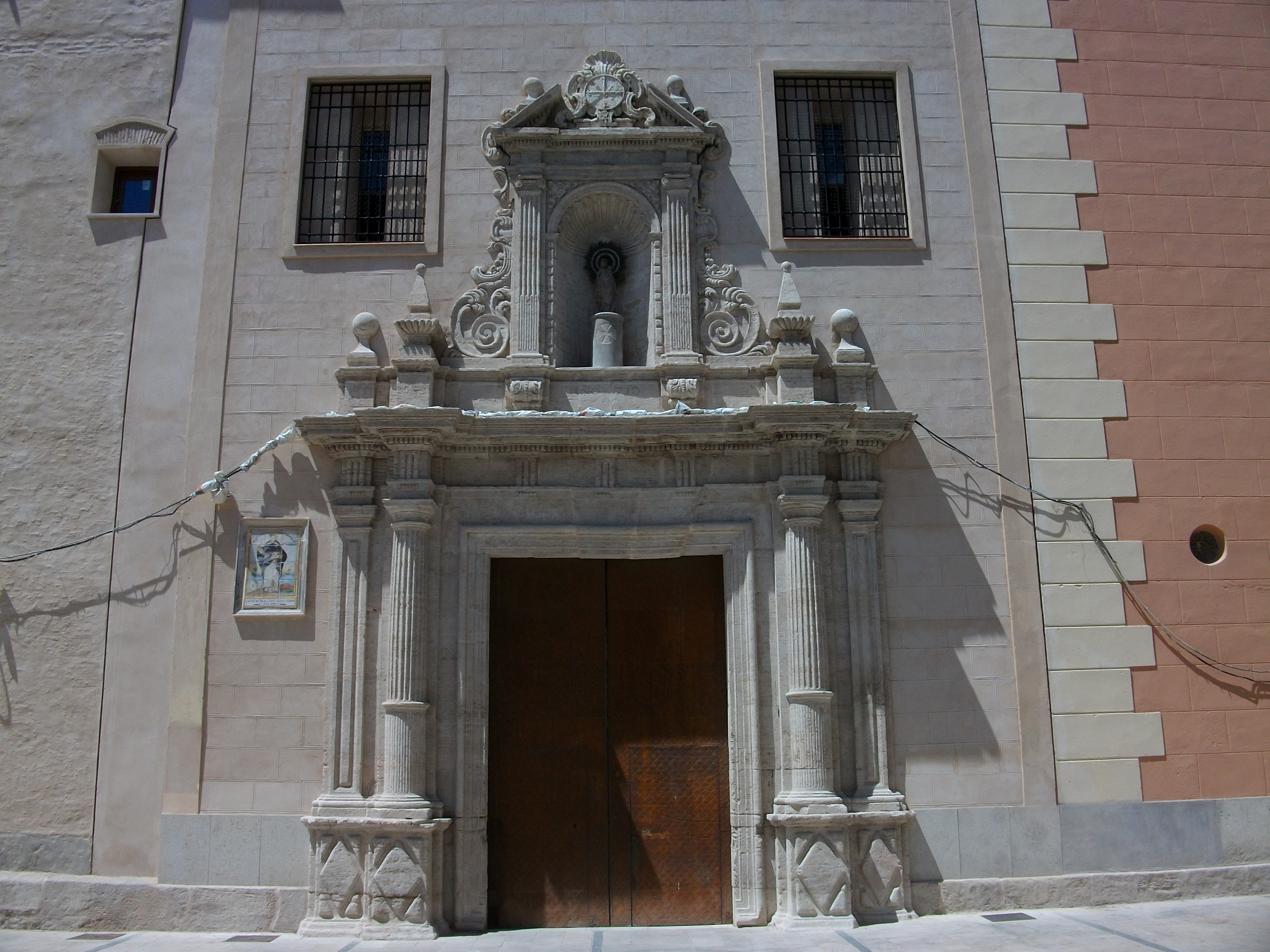 Portada de l'església del Pilar de València.